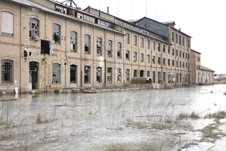 Ex zuccherificio Eridania a Ceggia.